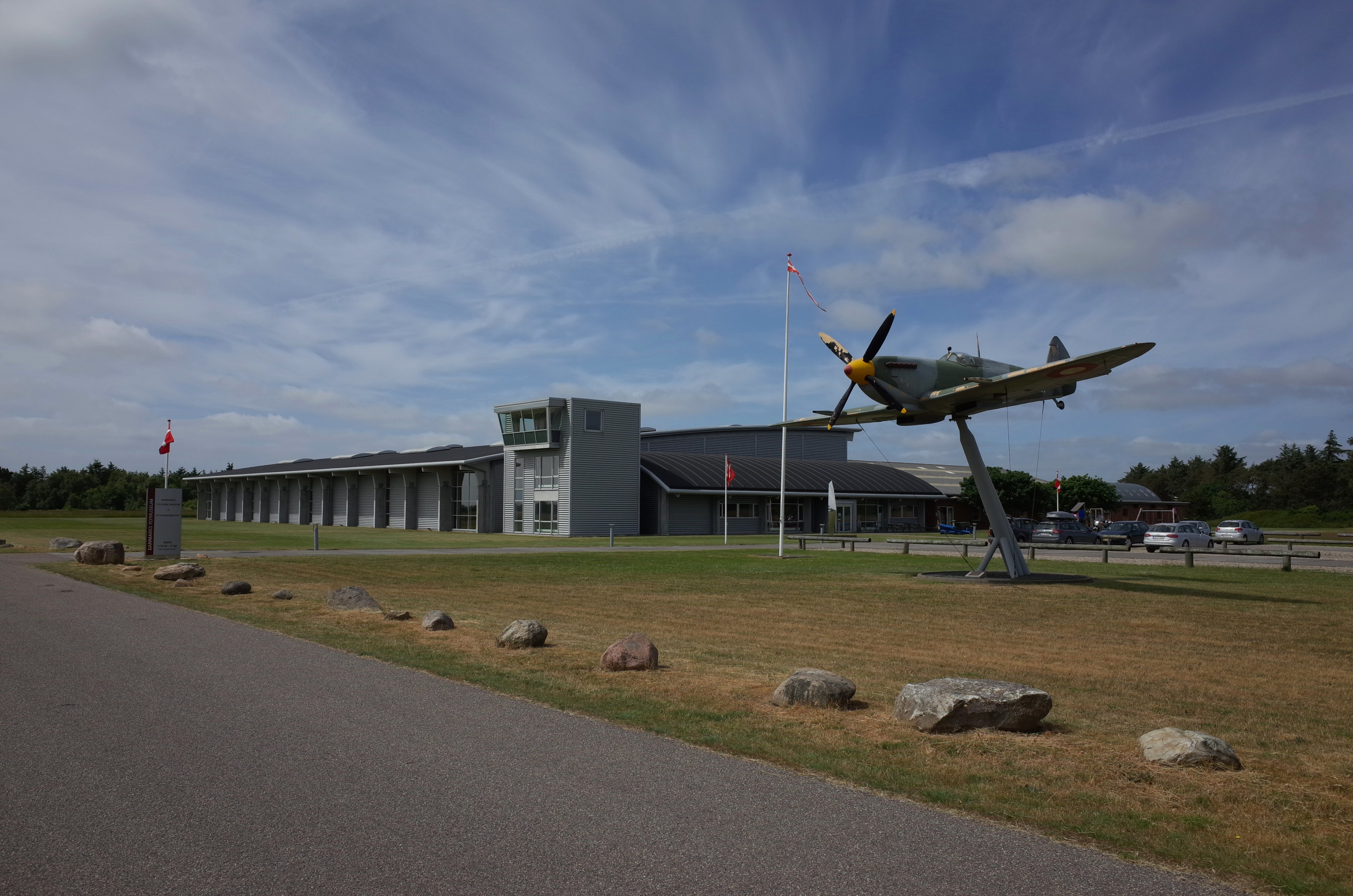 Danmarks Flymuseum, Dänemarks "fliegendes" Museum & Luftwaffenmuseum. Spitfire am Eingang zu den Ausstellungshallen.